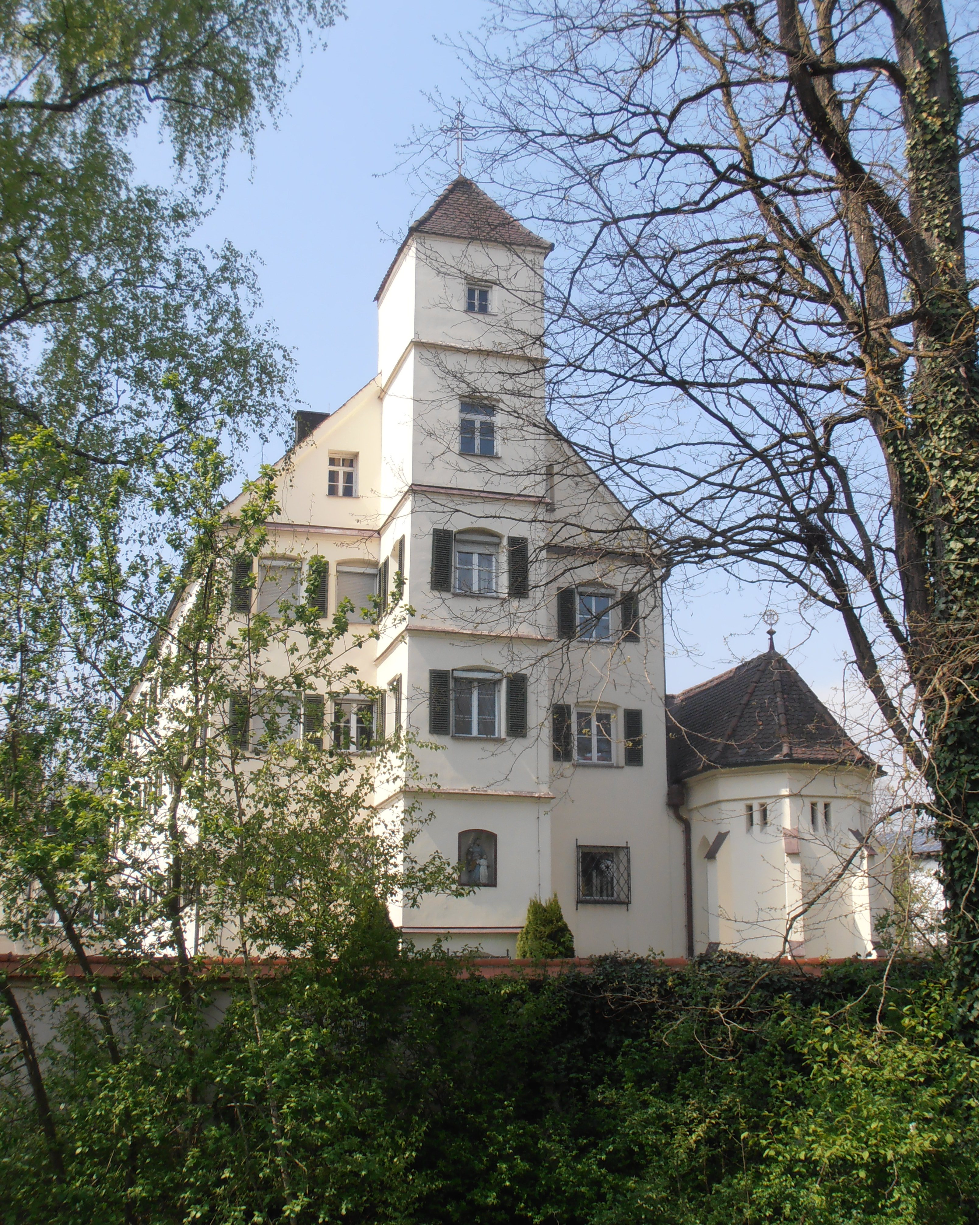 Josefsburg, auch Kolbergschlössl genannt, in Altötting